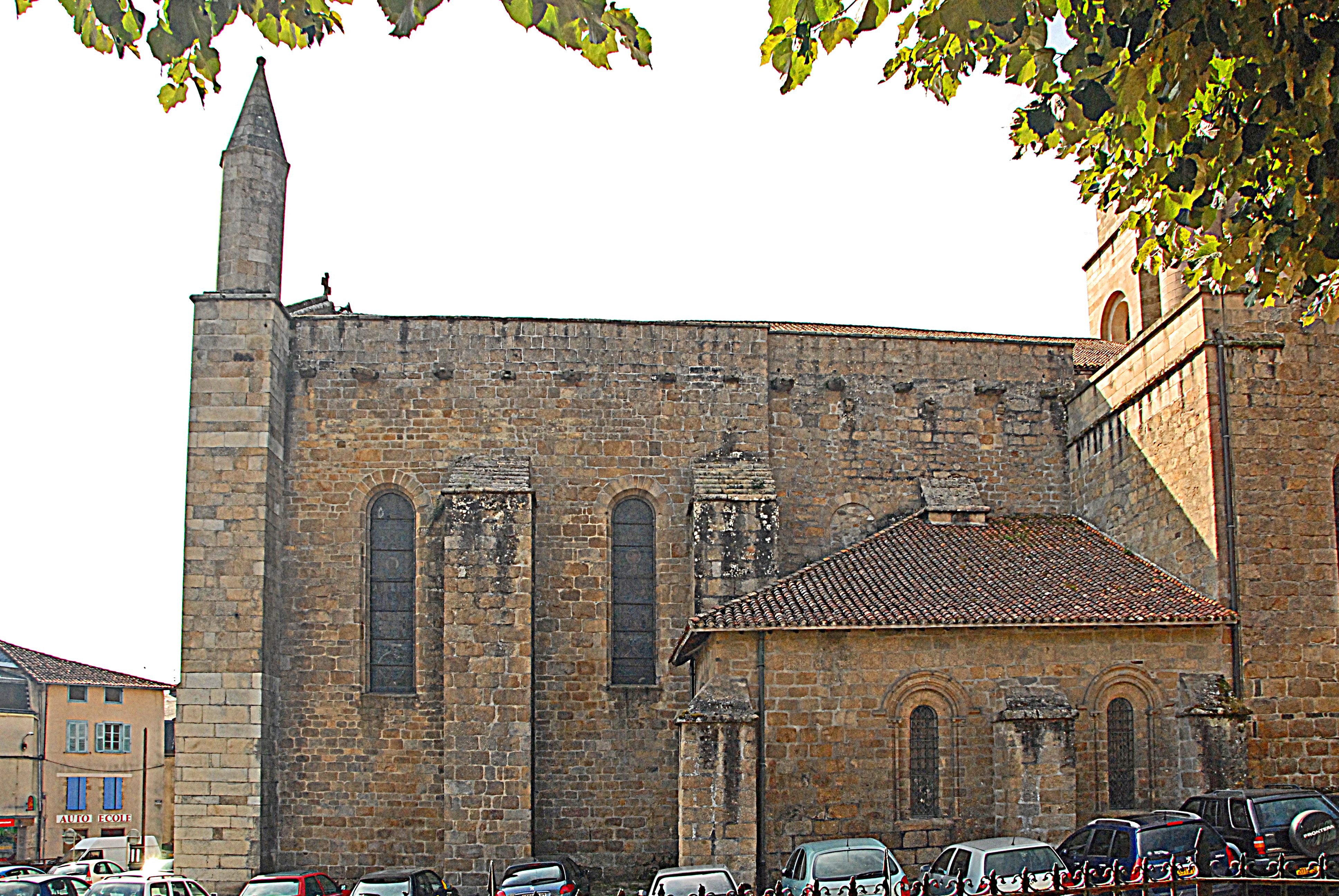 St-Junien, Chorhaupt von N